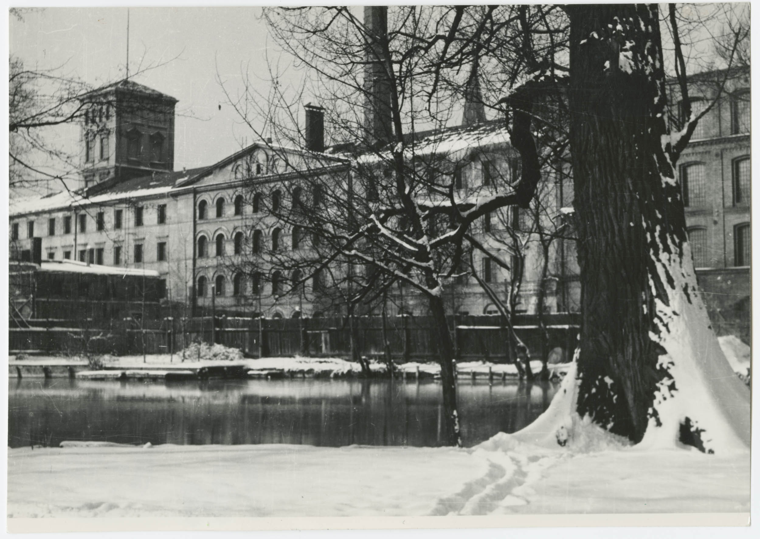 Fotografia Ignacego Płażewskiego przedstawiająca dawną fabrykę Ludwika Geyera znajdującą się przy ulicy Piotrkowskiej 282. (tzw. Białą Fabrykę). Widok zabudowań fabrycznych od strony stawu na rzece Jasień znajdujący się w parku im. Władysława Reymonta. Pierwszy właściciel fabryki przybył do Łodzi w 1828 r z Saksonii. Pierwotnie był właścicielem działki znajdującej się po południowej stronie stawu, następnie dokupił działki usytuowane po przeciwległej stronie. W latach 1835-1837 wybudował na nich największą wówczas fabrykę w Łodzi – przędzalnię bawełny o uproszczonych formach klasycystycznych. W przeciwieństwie do innych fabryk powstających w mieście, fabryka Ludwika Geyera została otynkowana – stąd też jego nazwa „Biała Fabryka”. W 1847 r. dobudowano skrzydło południowe (widoczne na zdjęciu), a w 1886 r. skrzydło wschodnie. Po II wojnie światowej narodziła się idea utworzeni muzeum tkactwa w Łodzi. W 1952 r. powstał Dział Tkactwa przy Muzeum Sztuki, a w 1955 r. uzyskał własną siedzibę w Białej Fabryce. W 1960 r. na terenie dawnej fabryki Ludwika Geyera powstało Muzeum Historii Włókiennictwa, przemianowane w 1975 r. na Centralne Muzeum Włókiennictwa. Pod tą nazwą funkcjonuje do dziś.